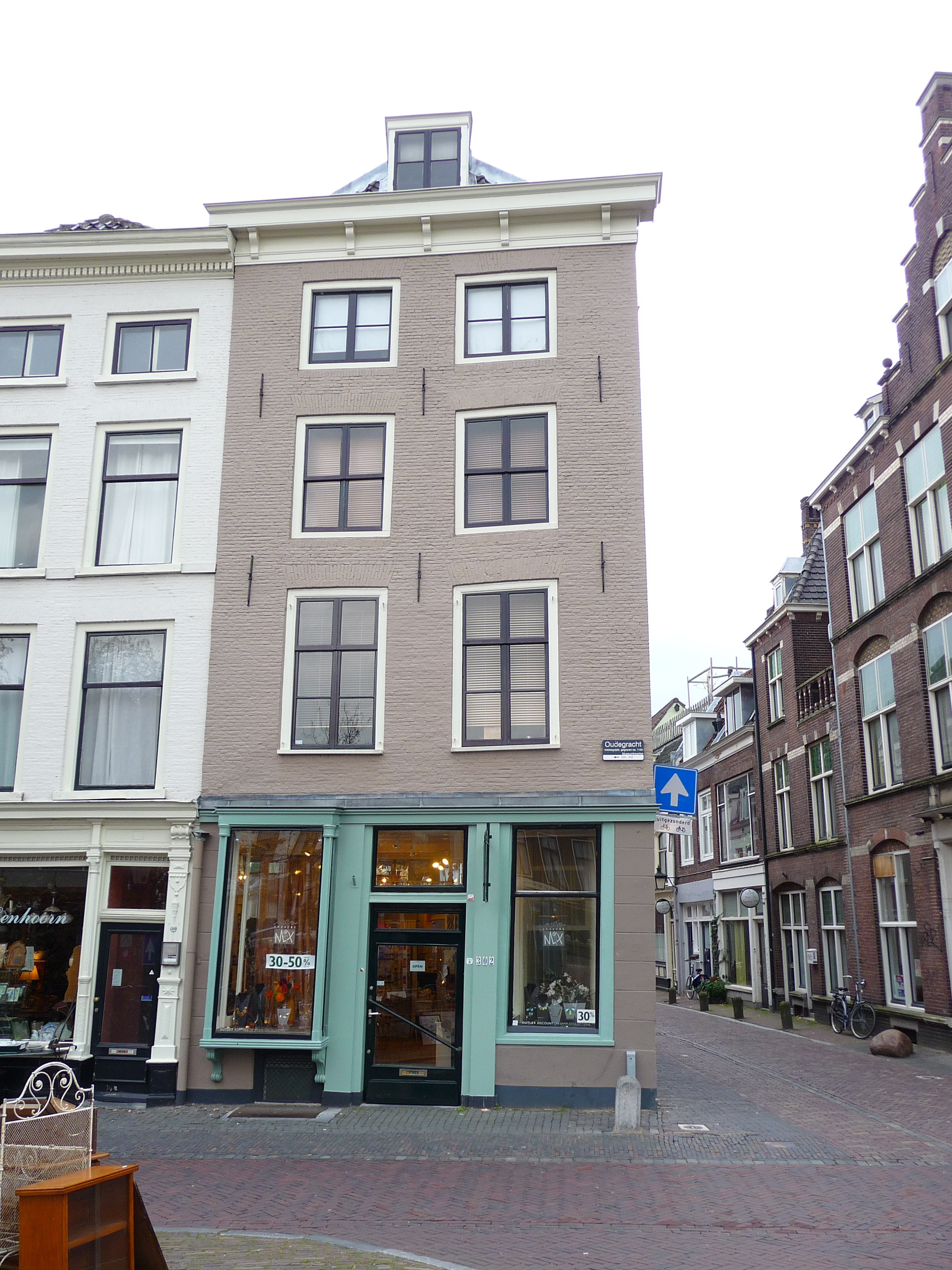 Rijksmonument aan de Oudegracht in Utrecht (stad)